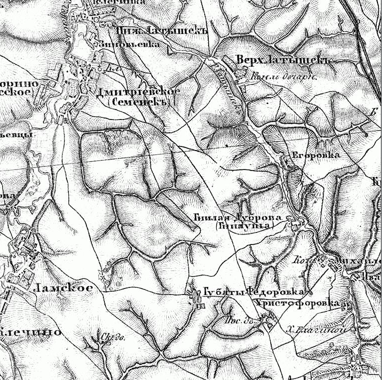 Военно-Топографическая карта Российской Империи Ф.Ф. Шуберта 1846-1863 г.г.